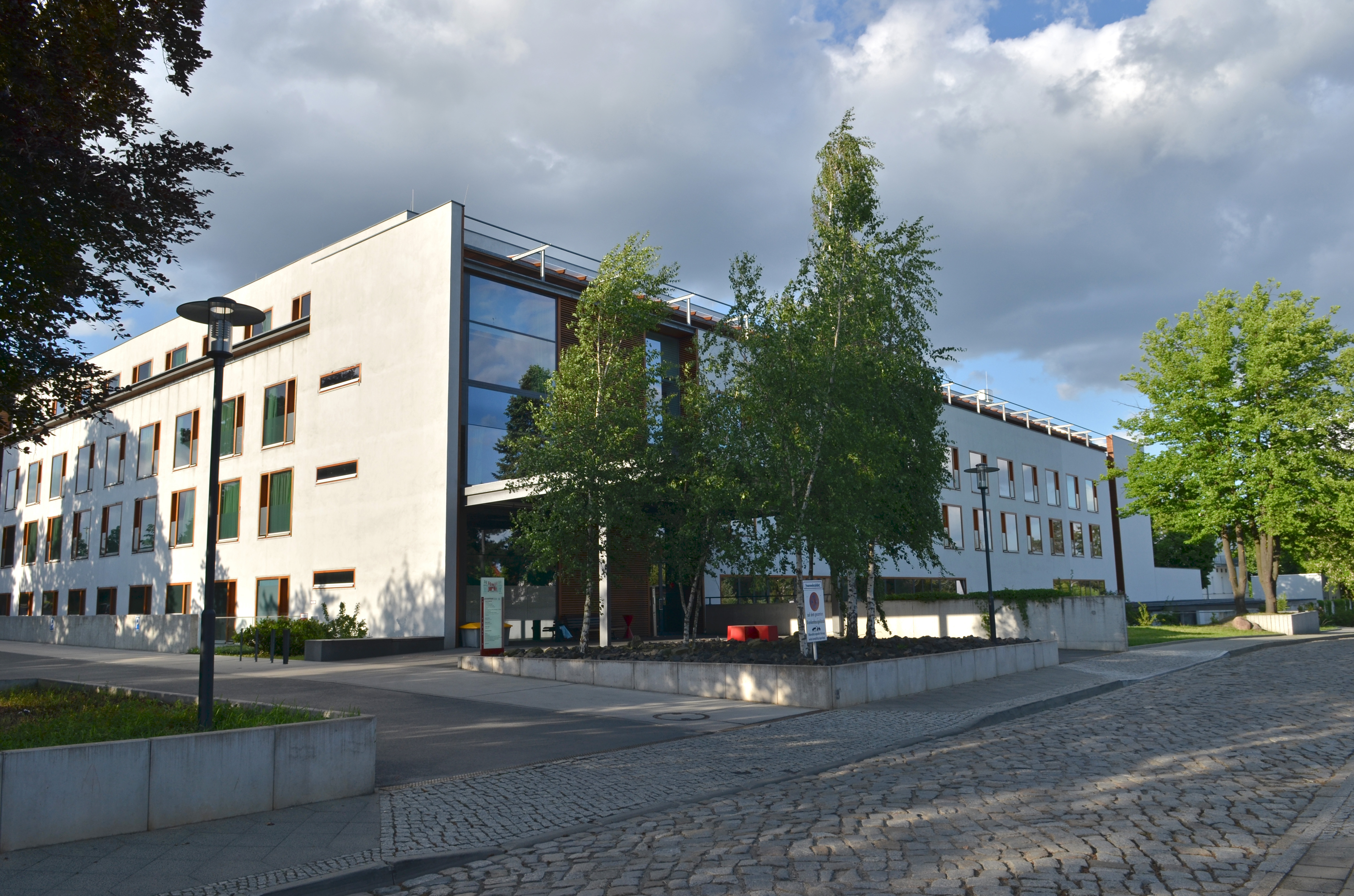 Krankenhaus Hedwigshöhe (Straßenansicht), Berlin Bohnsdorf